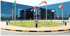 مبنى المقر الرئيسي ومبنى الجامعة العربية المفتوحة بالكويت